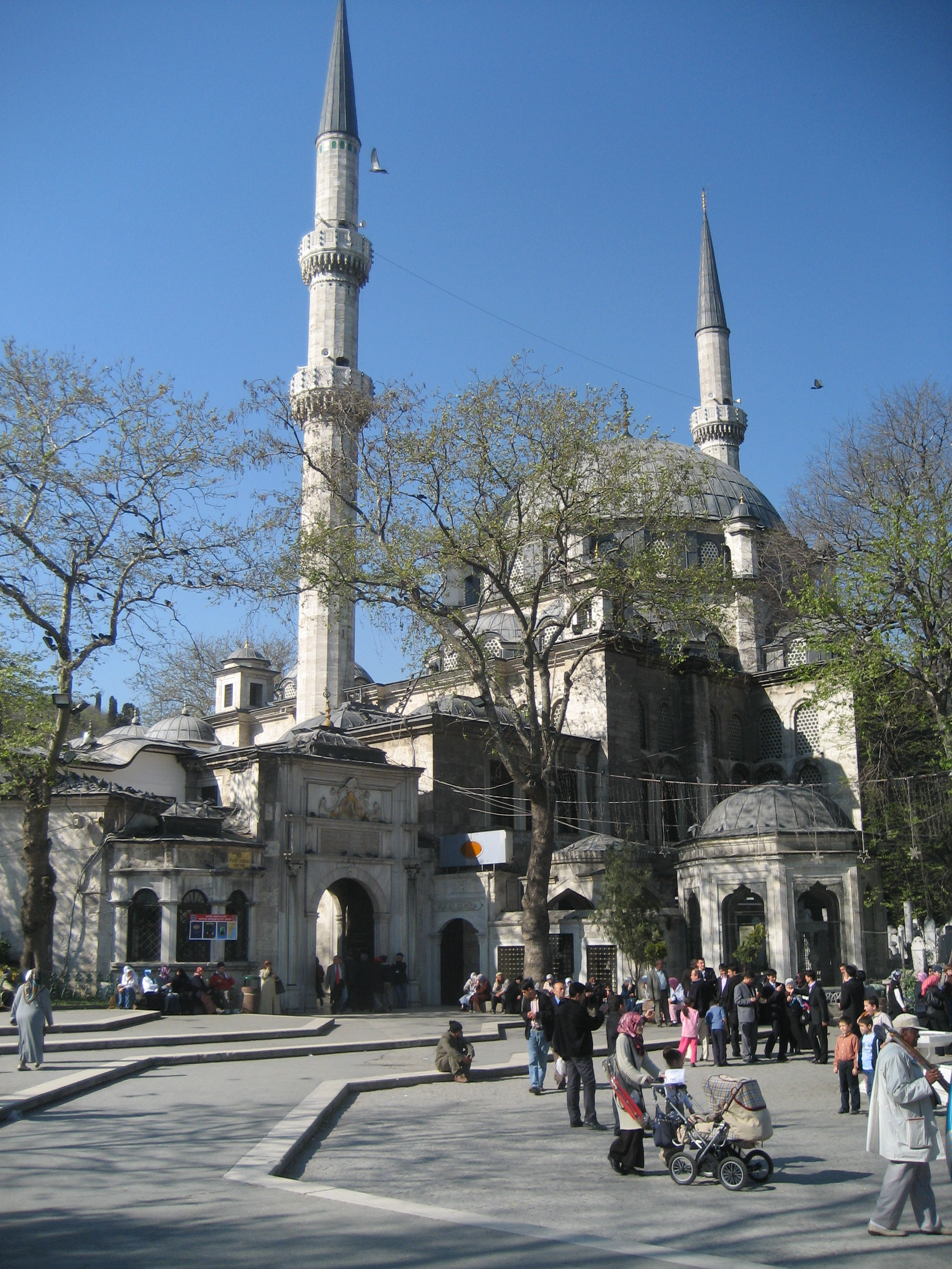 Eyup Mosque